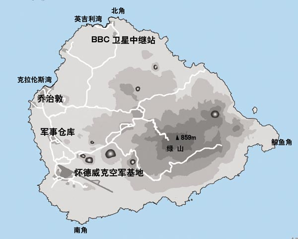 阿森松岛要图。